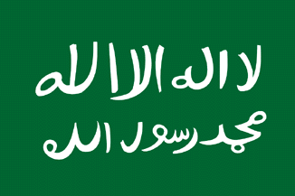 Bandera de Asir 1909-27 Imagen realizada por J. Ollé Véase también: Wikipedia:Autorizaciones/Banderas de Jaume Ollé Categoría:Banderas (imagen)